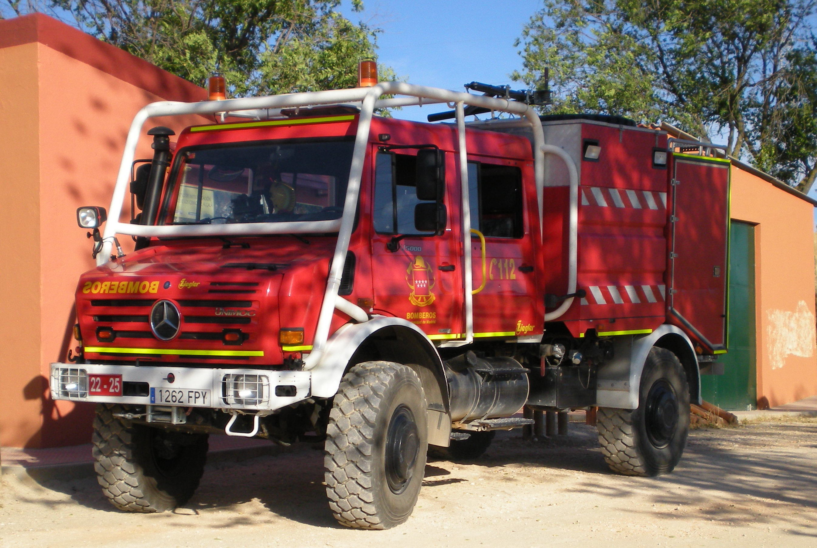 Camión de bomberos, Alcalá de Henares Comunidad de Madrid España